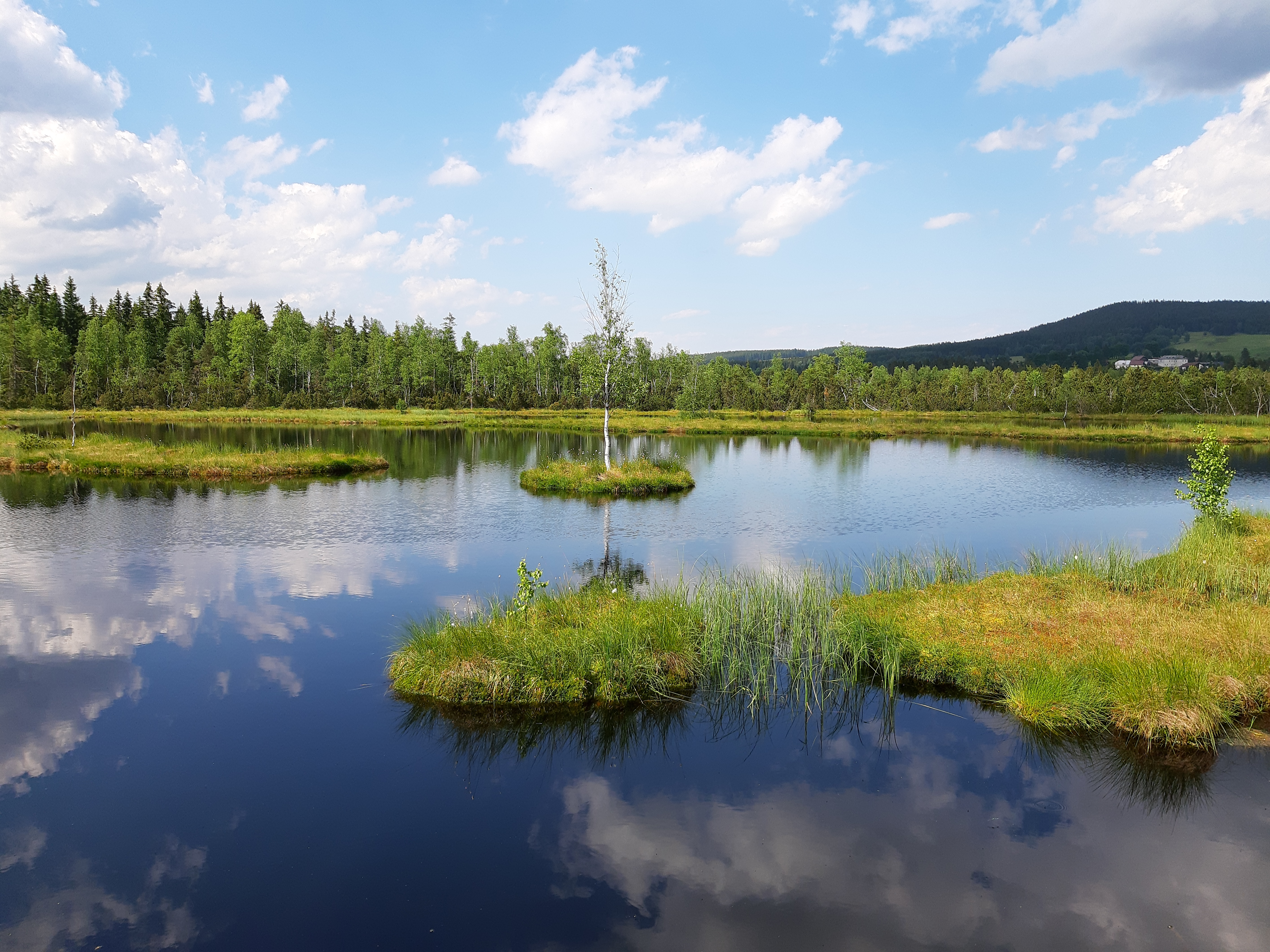 Chalupská slať (Šumava).